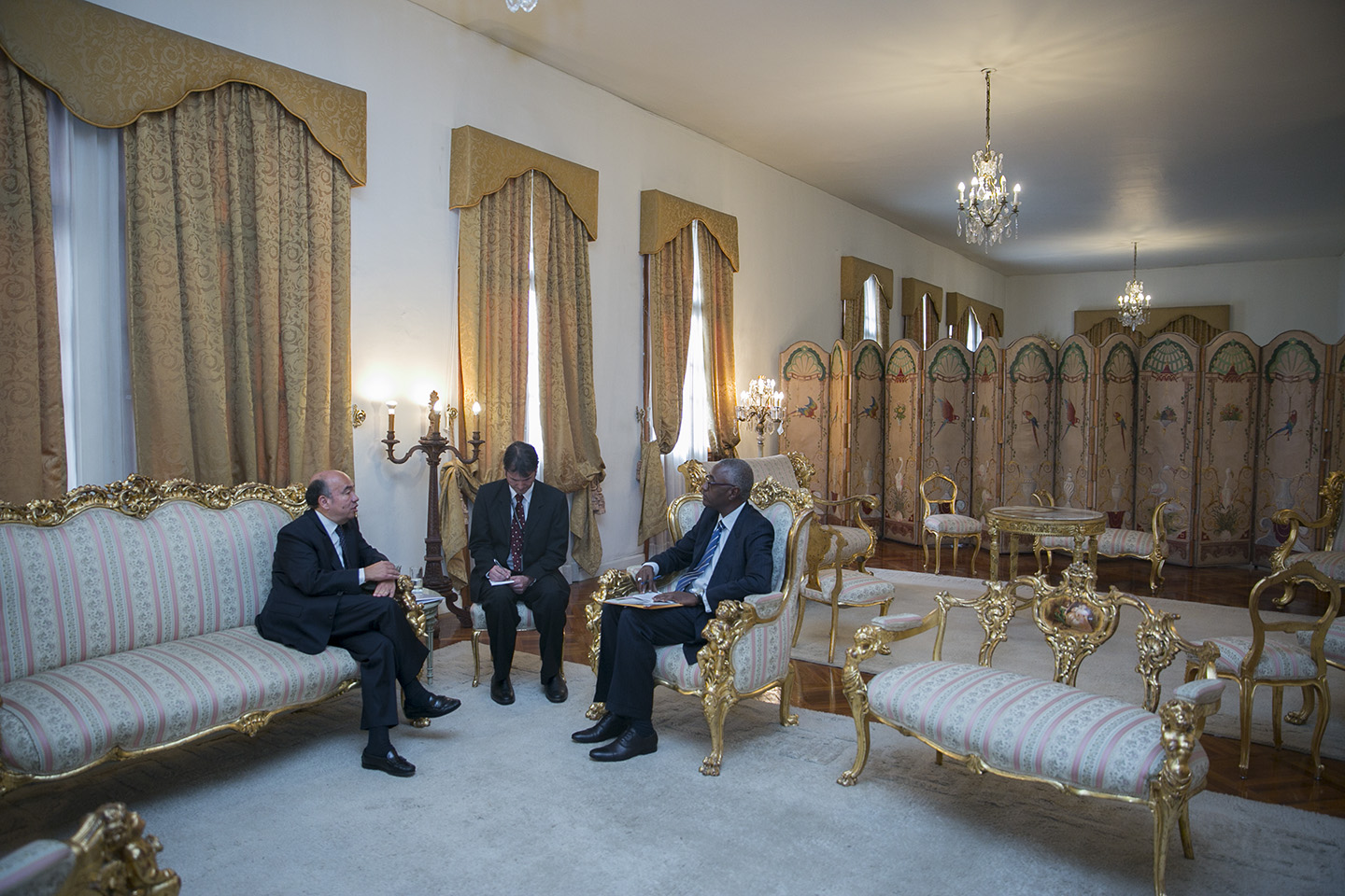 Quito (Ecuador), 13 de abril de 2016. El Canciller (s) Fernando Yépez recibió Copia de cartas credenciales de Siddig Mohamed Abdalla, Embajador de Sudán. Foto: Luis Astudillo C. / Cancillería